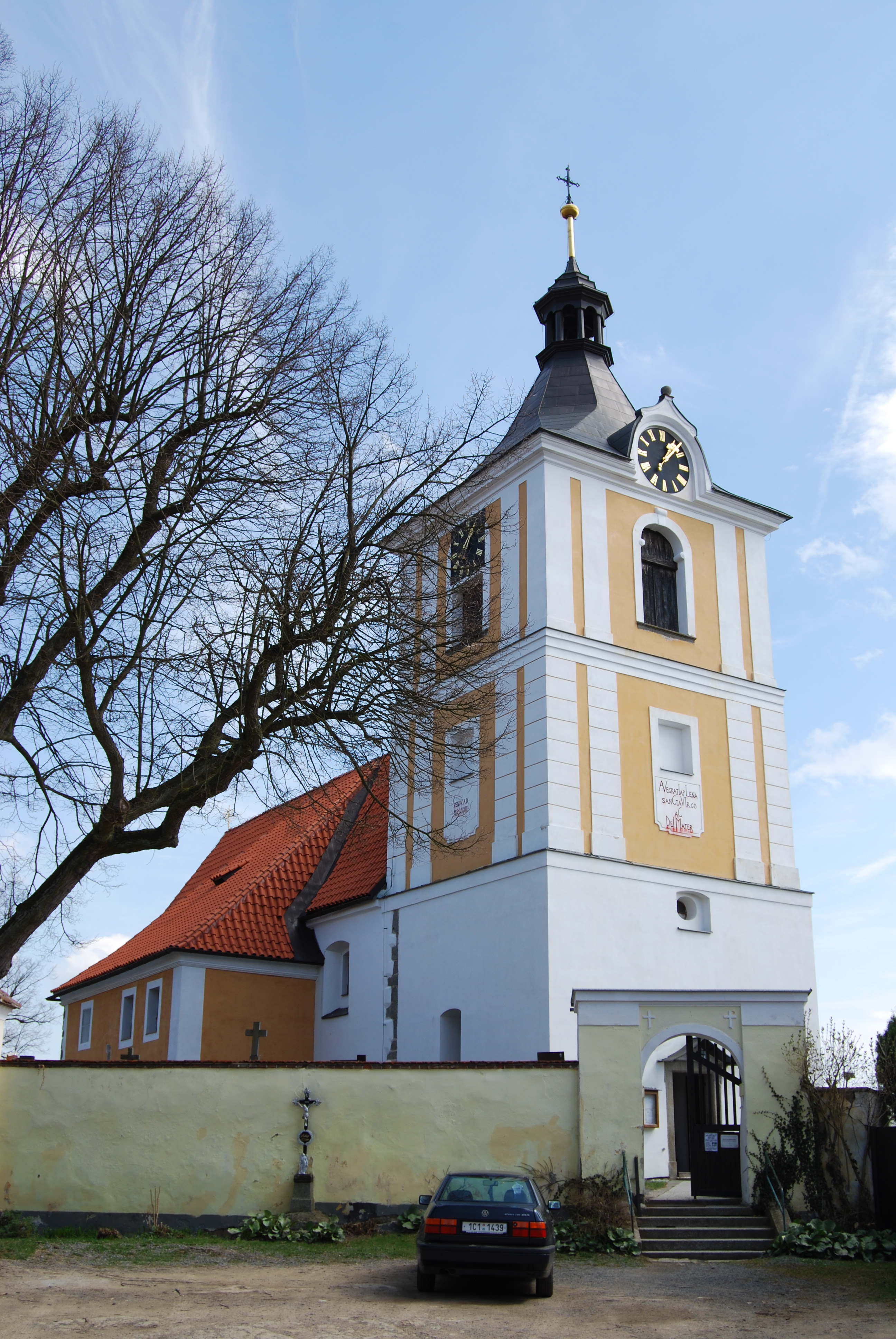 Kostel Narození Panny Marie v obci. Kostelec nad Vltavou. Okres Písek. Česká republika.